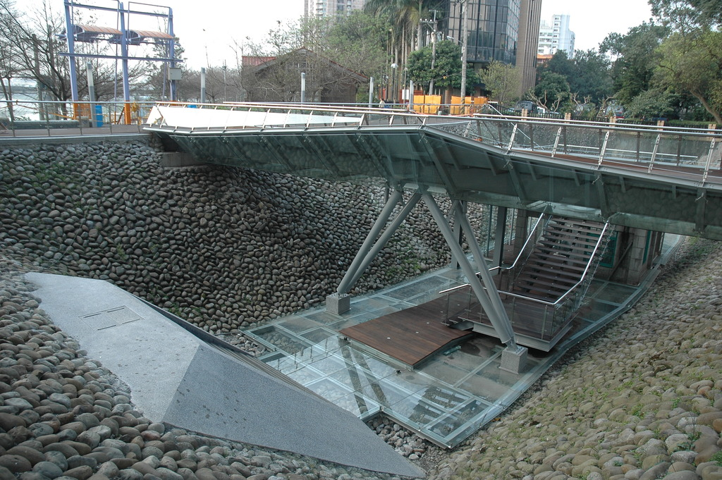 中文（台灣）: 瑠公圳的圳頭（取水口）在北二高碧潭大橋的下方